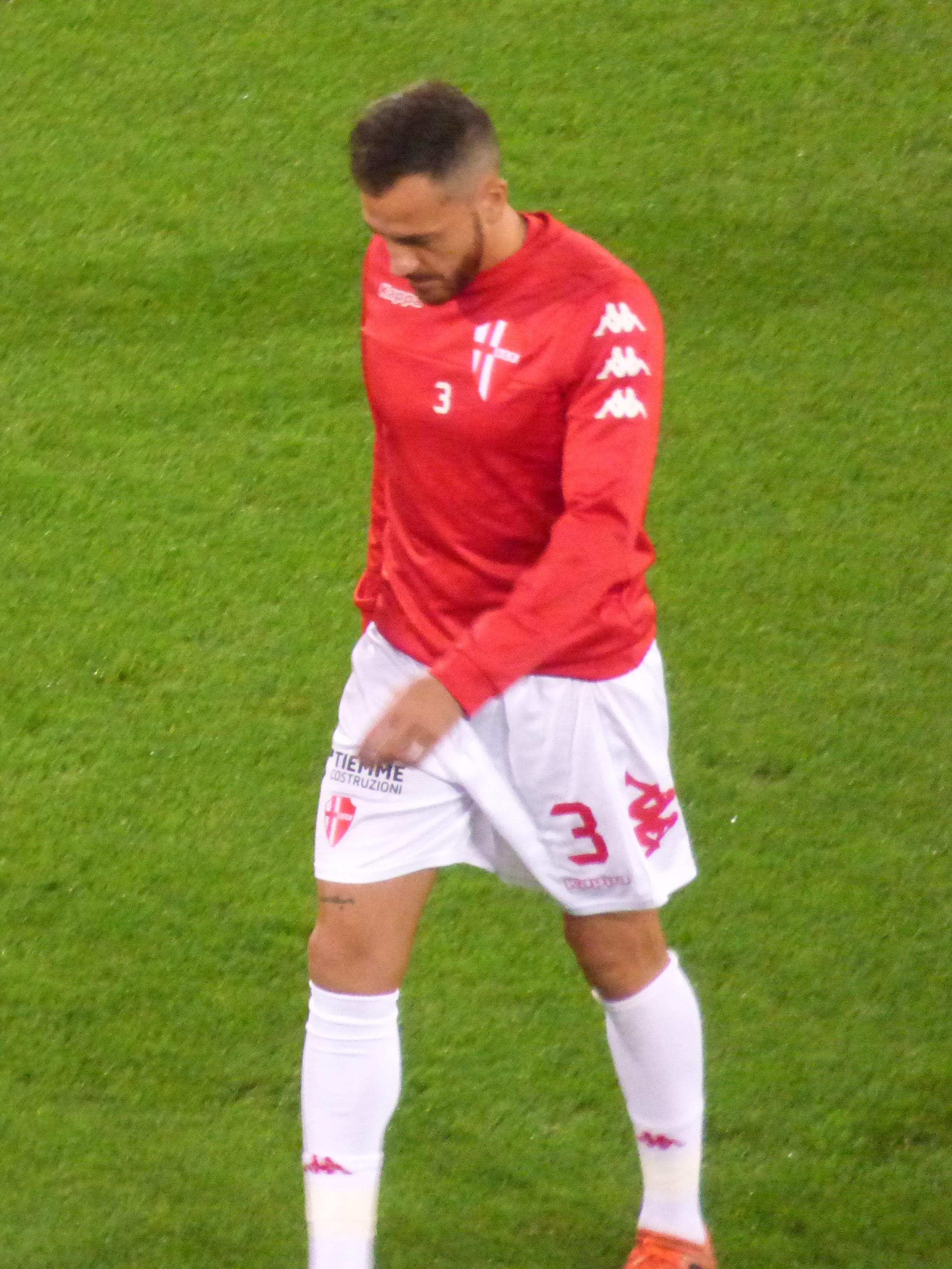 Sergio Contessa lors du match amical RC Lens - Calcio Padova, le 11 octobre 2018 au Stade Bollaert-Delelis de Lens.